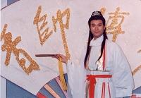 臺灣電視公司八點檔連續劇《香帥傳奇》演員鄭少秋